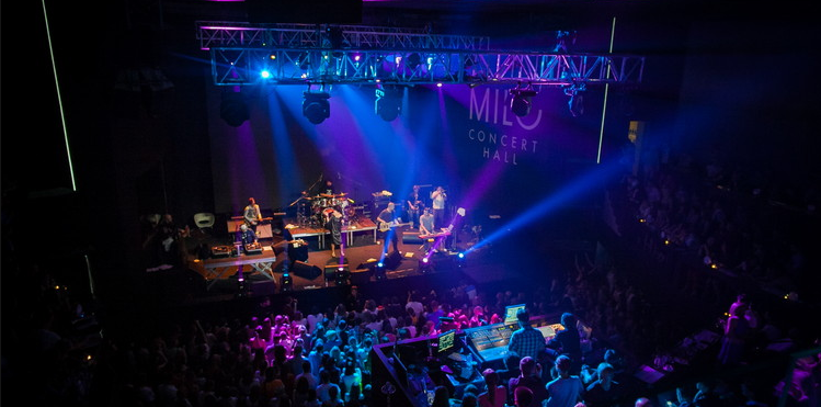 Концерт Певицы Ёлки в клубе Нижнего Новгорода Milo Concert Hall